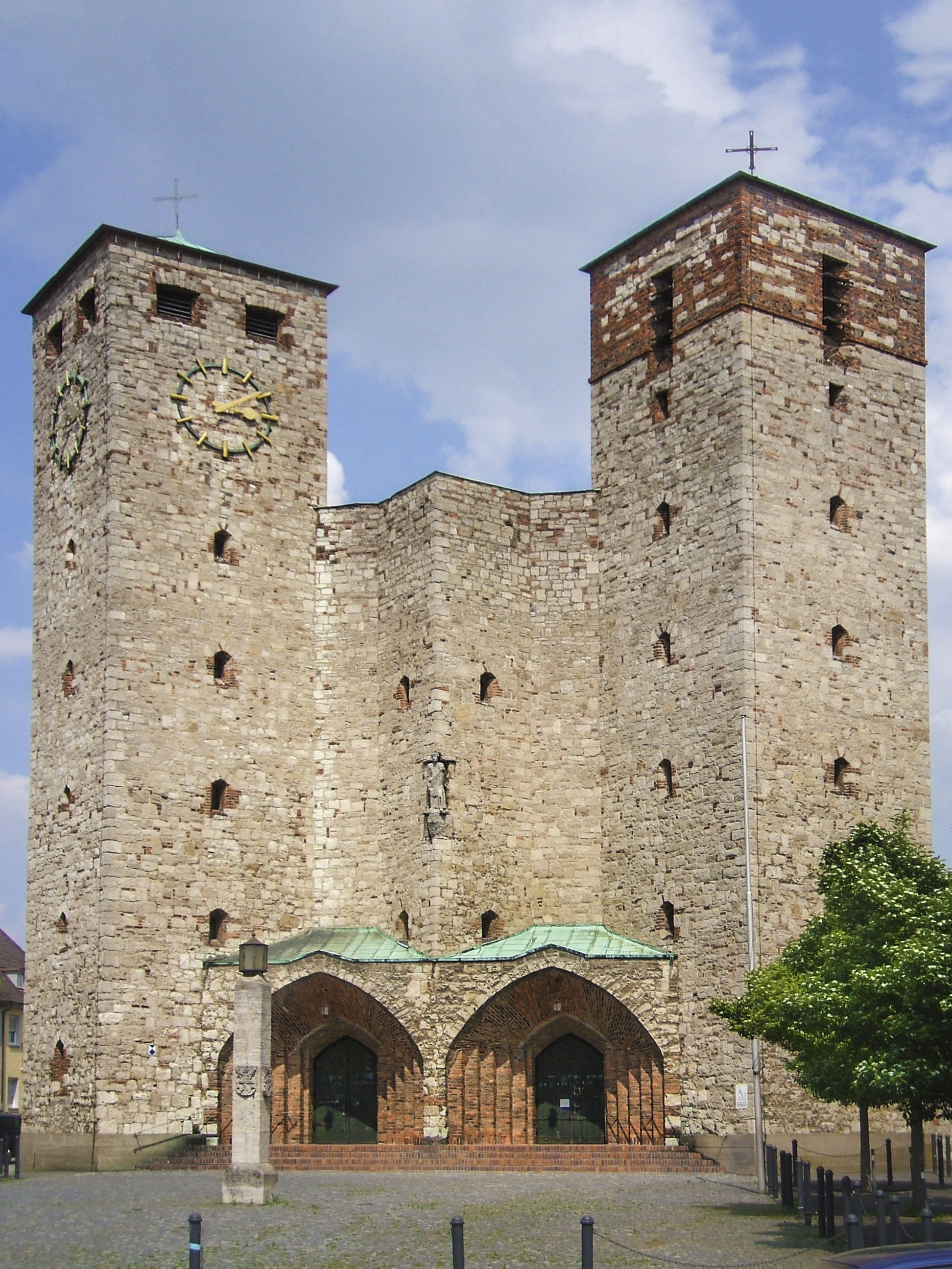 Kath. Pfarrkirche St. Heinrich Bamberg